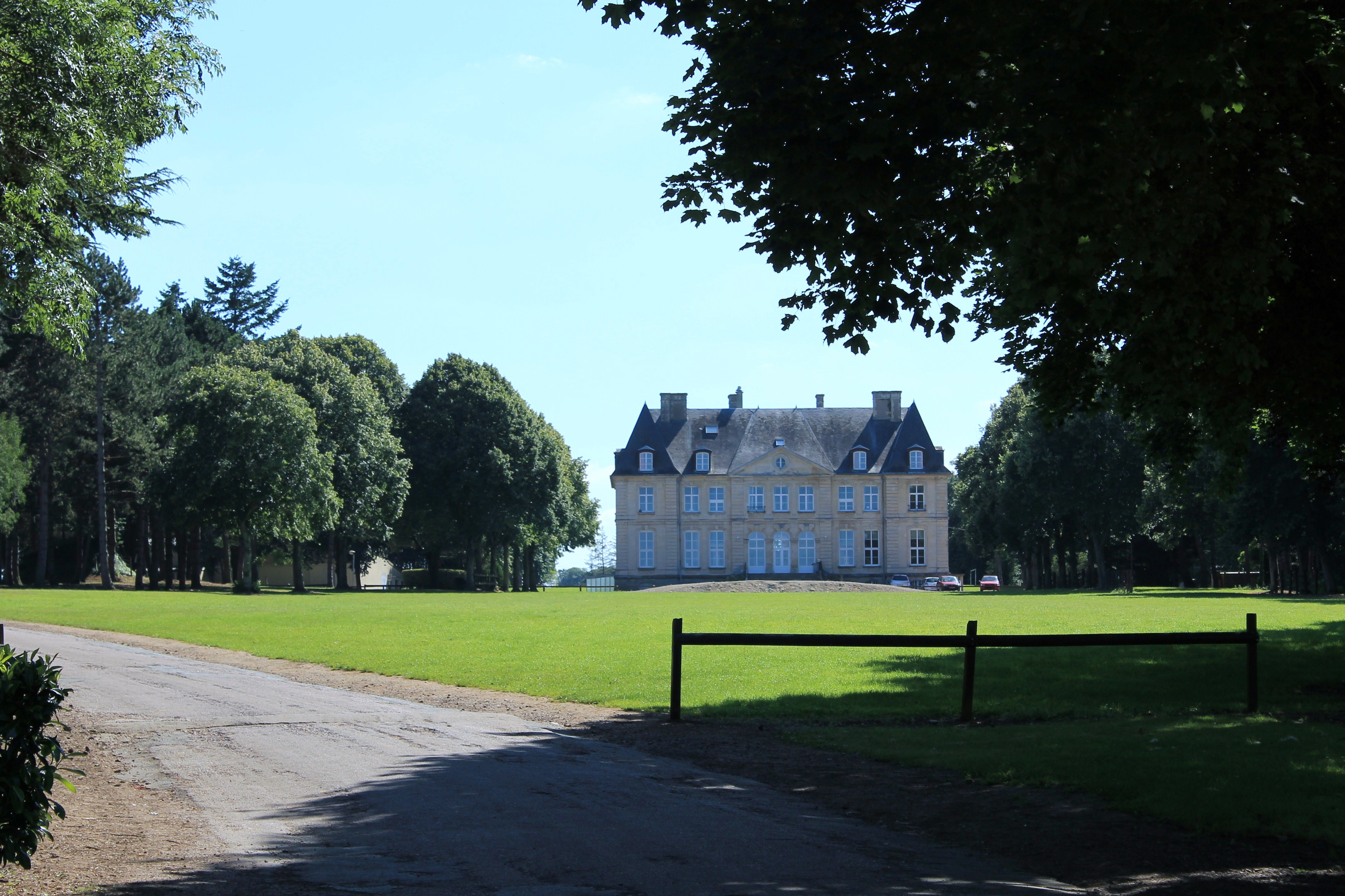 Château de Maltot, Calvados